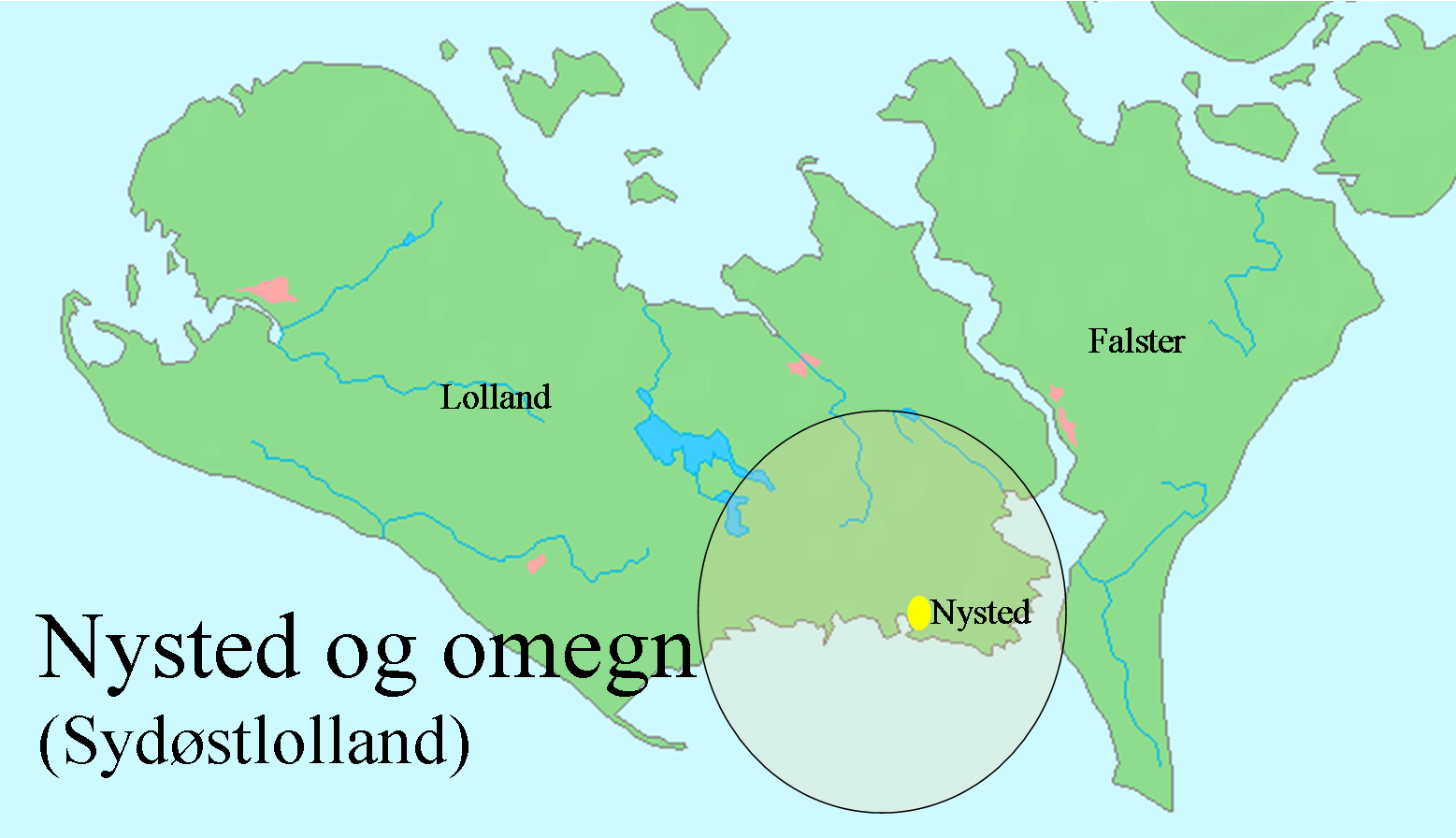 Kort over Lolland-falster med fokus på Nystedegnen